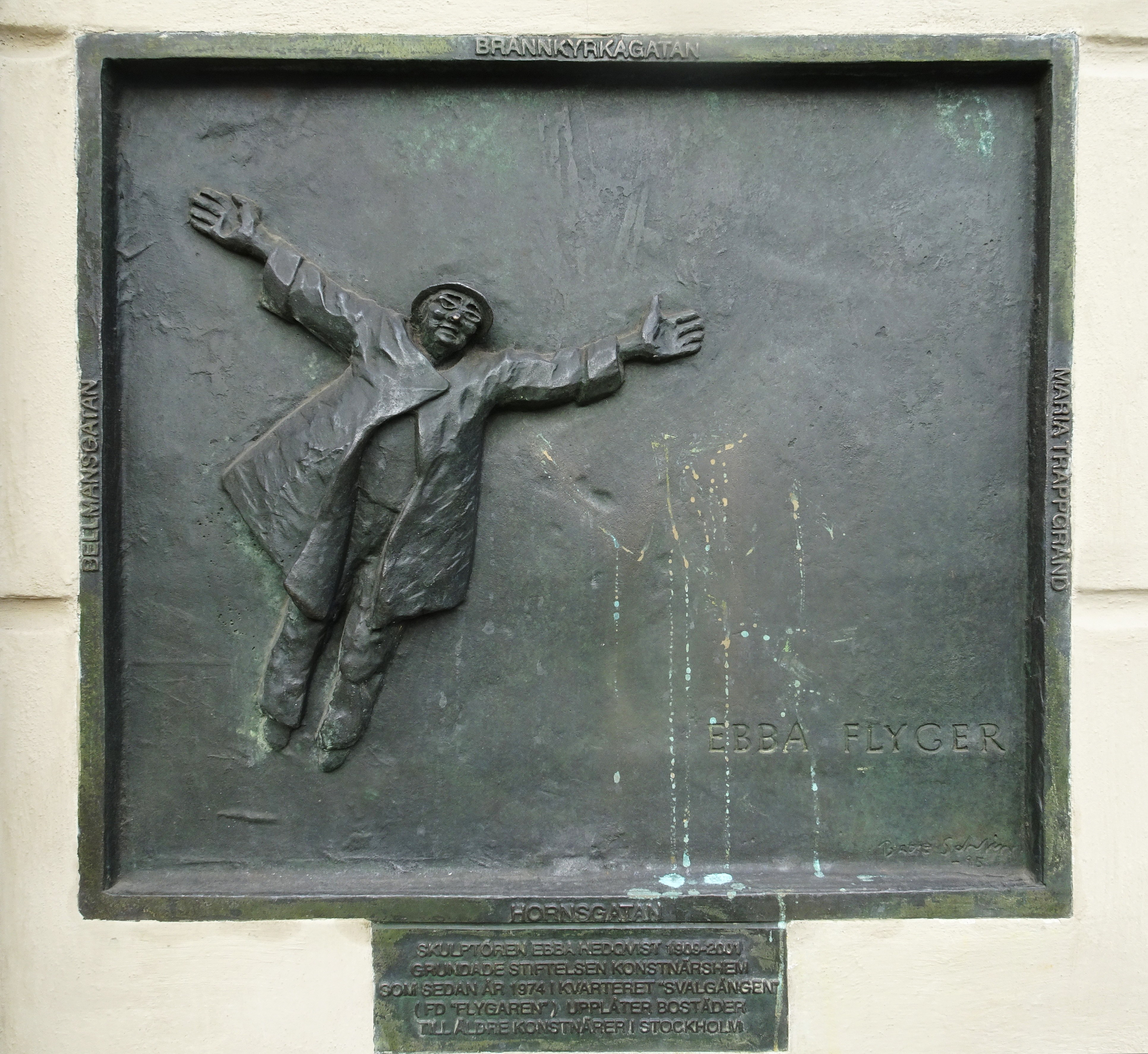 Kvarteret Svalgången, minnestavla av Batte Sahlin visande Ebba Hedqvist "Ebba Flyger"